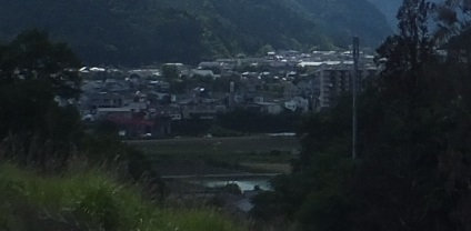 宍粟市中心部